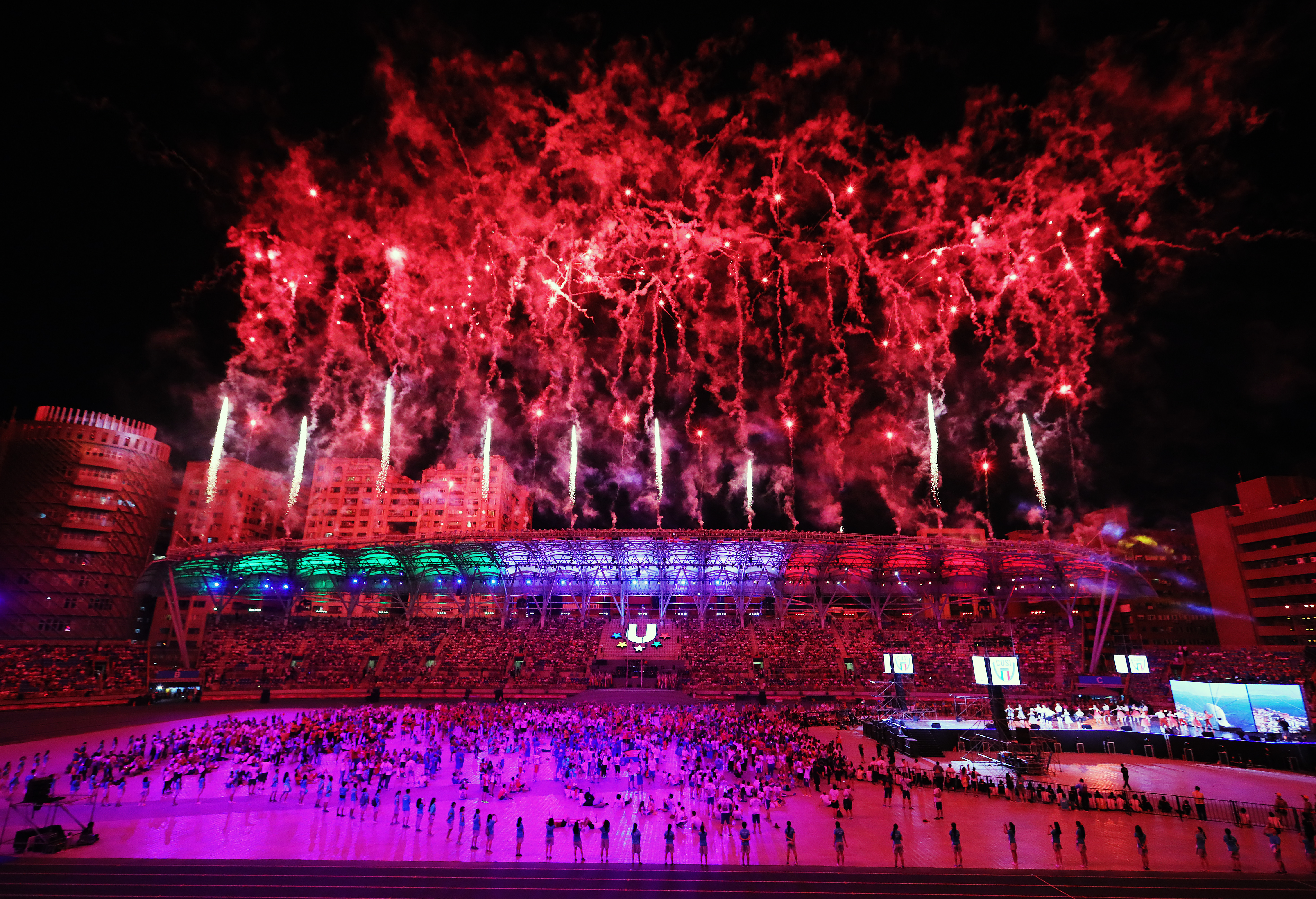 授權方式及範圍：中華民國總統府│政府網站資料開放宣告 Authorization Method & Scope: Office of the President, Republic of China (Taiwan) | Government Website Open Information Announcement